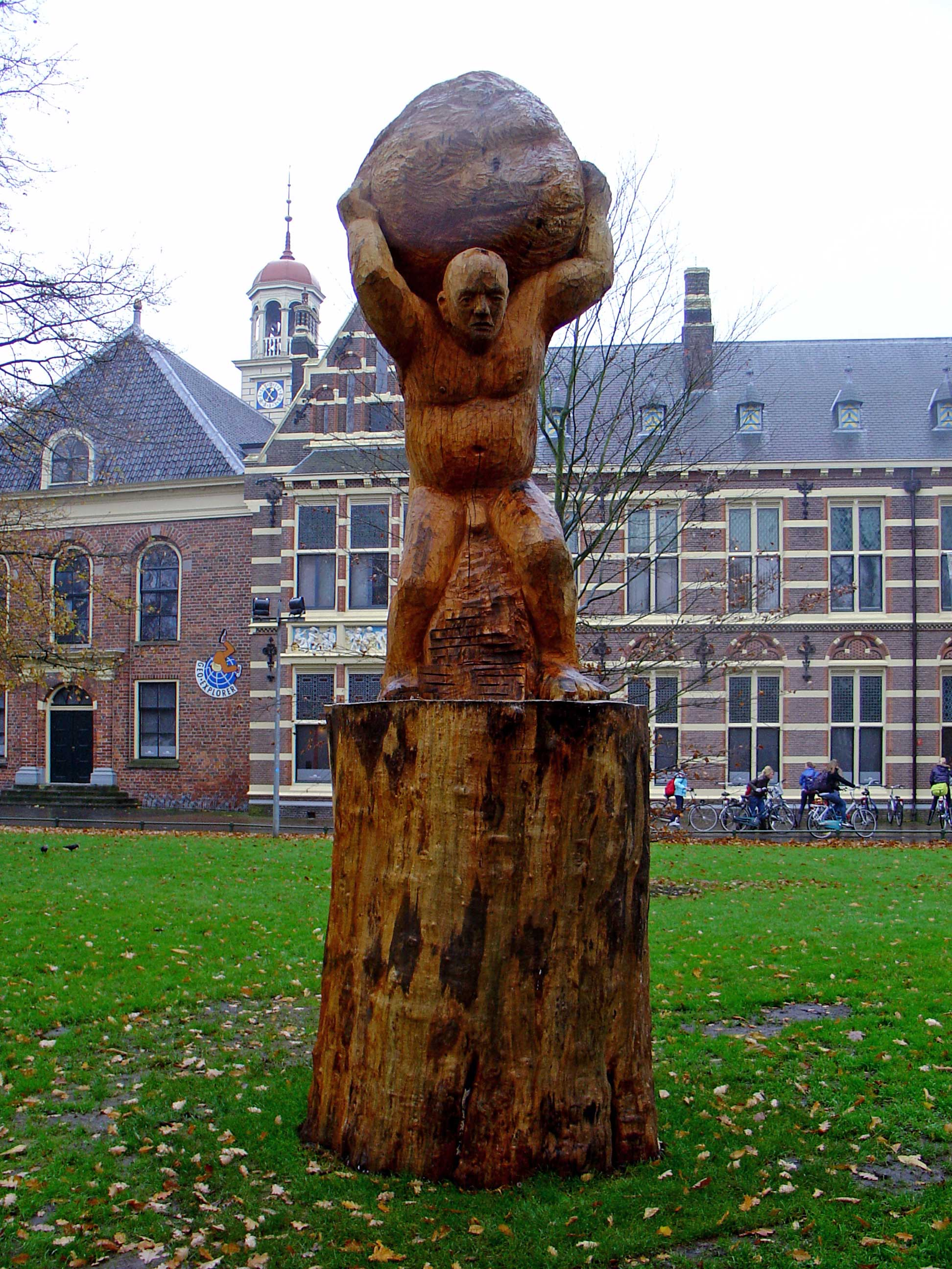 Sisyphus door Gert Sennema in Assen